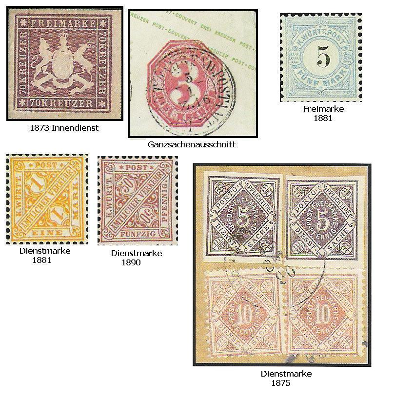 Ein kleiner Nachtrag zur Württemberg Freimarken